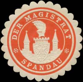 Sealing stamp Title: Der Magistrat Spandau Description: rot, weiß, geprägt Place: Berlin size: 4 cm